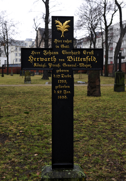 Grabstelle des preußischen Generalmajors Johann Eberhard Ernst Herwarth von Bittenfeld (1753-1833) auf dem Alten Garnisonsfriedhof in Berlin-Mitte.